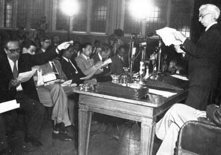 Рассел оглашает Манифест Рассела - Эйнштейна. Лондон